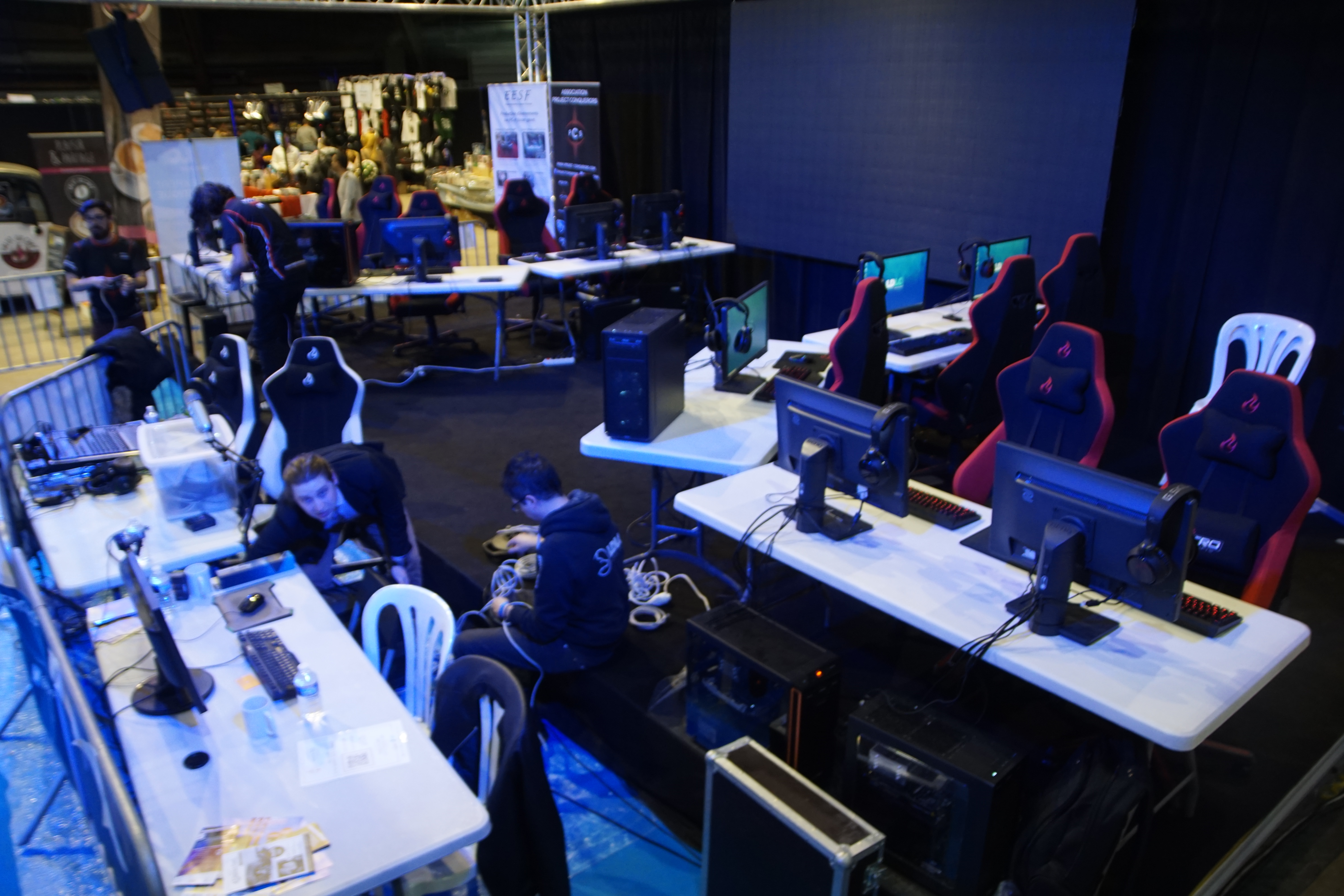 Stand League of Legends de Project Conquerors à Avignon lors de la Geek Expo 2019 pour les phases finale de la PCS Ligue 1.